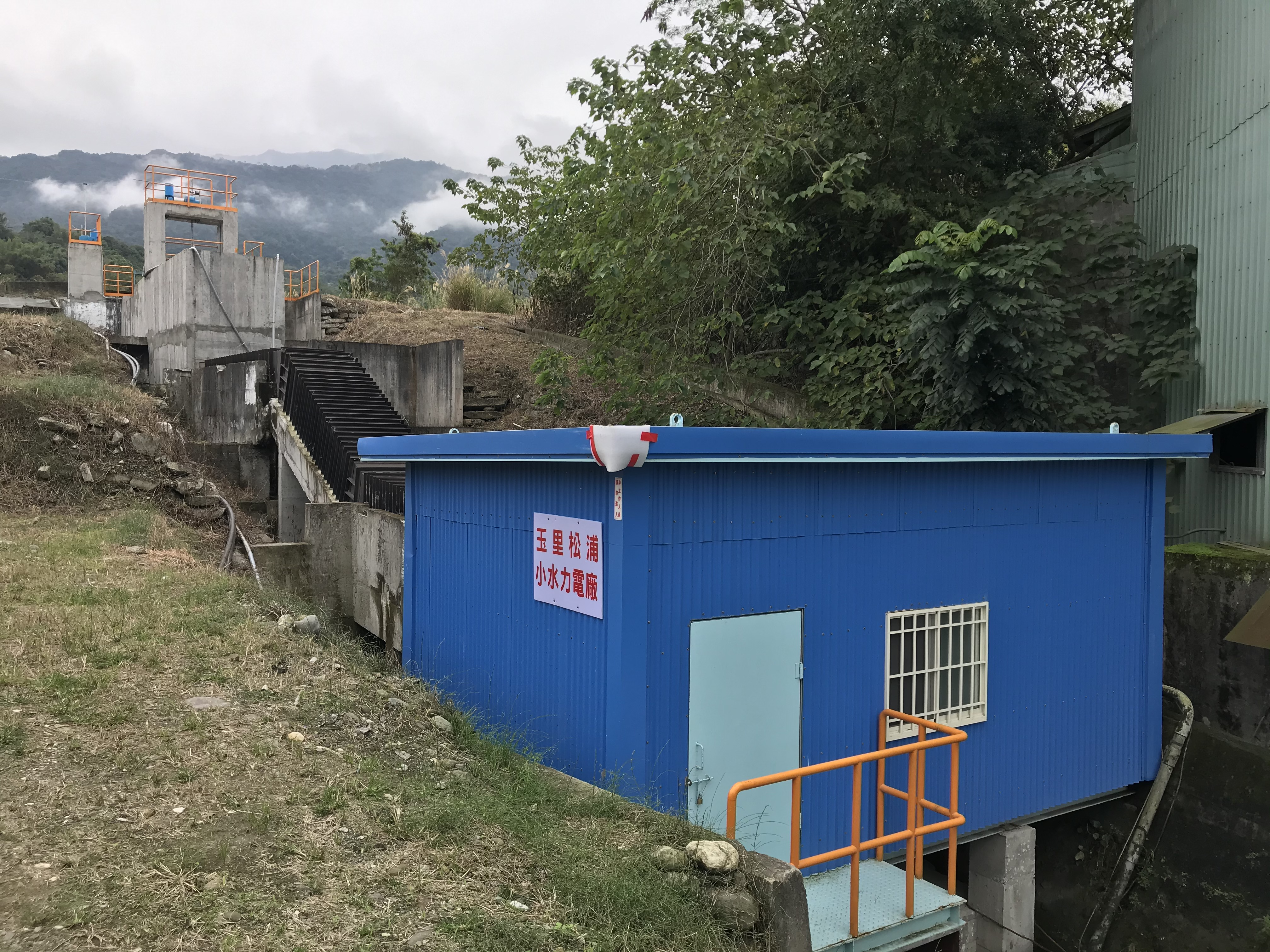 臺灣花蓮縣玉里鎮松浦小水力發電廠